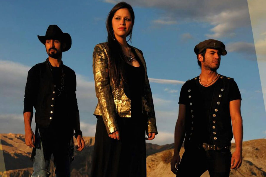 De izquierda a derecha: Alejandro "Negro" de Ugarte, Mariela Jordan y Sergio "Teto" de Ugarte.